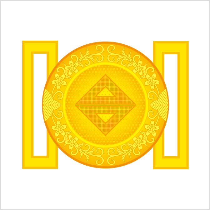 臺灣總督府文官劍帶頭Redraw Government-General of Taiwan Gazette.